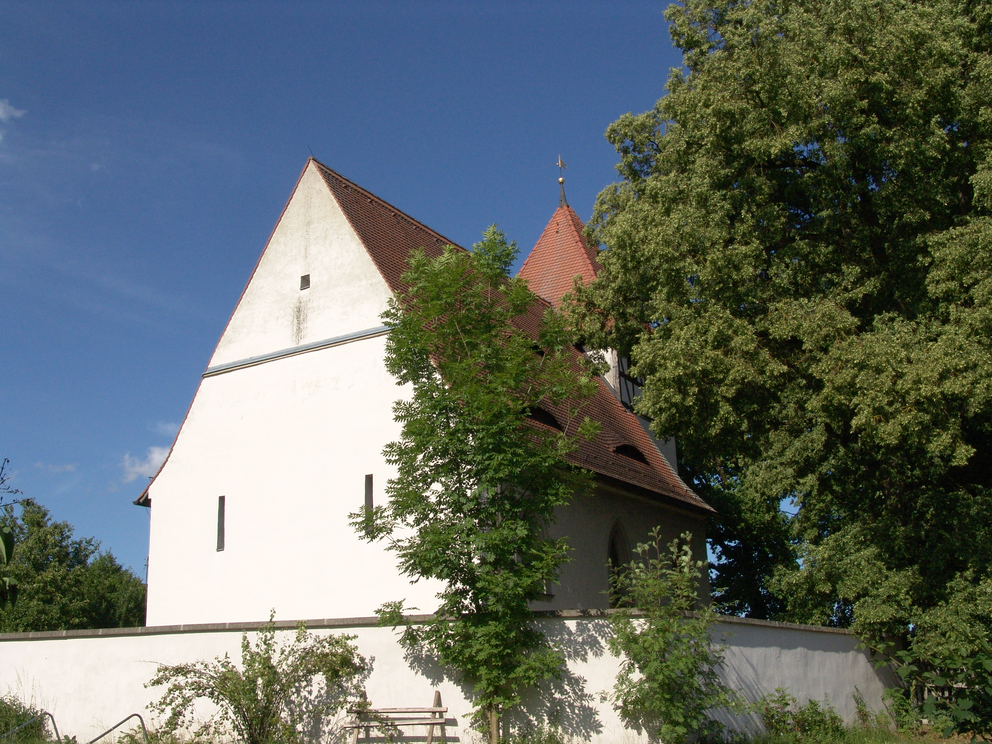 Pretzdorf, Evangelische Kirche